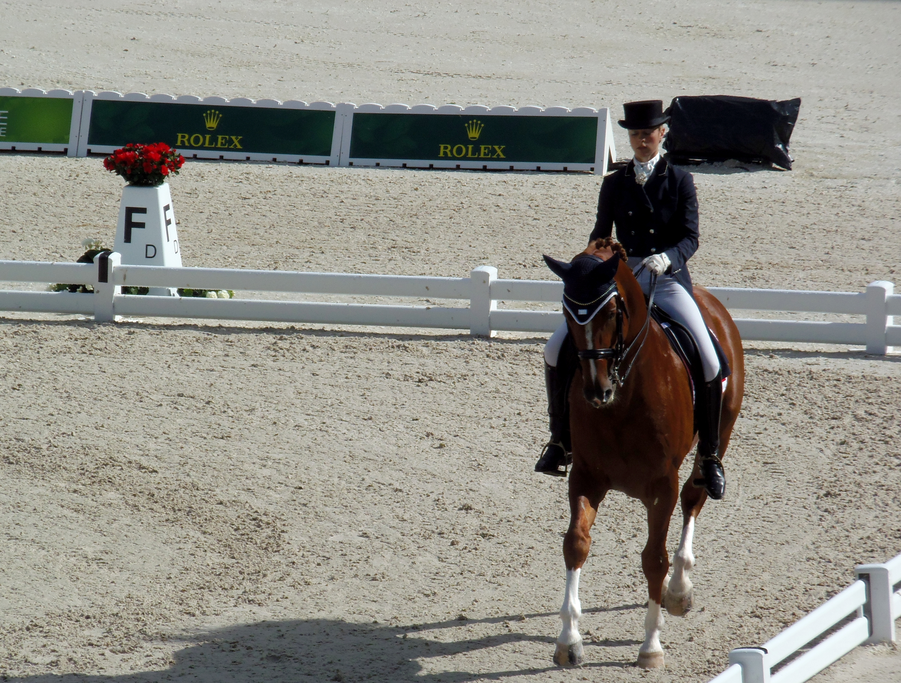 Trude Hestengen en selle sur Tobajo Pik Disney lors des Jeux équestres mondiaux, le 26 août 2014 au stade d'Ornano à Caen (Normandie, France).